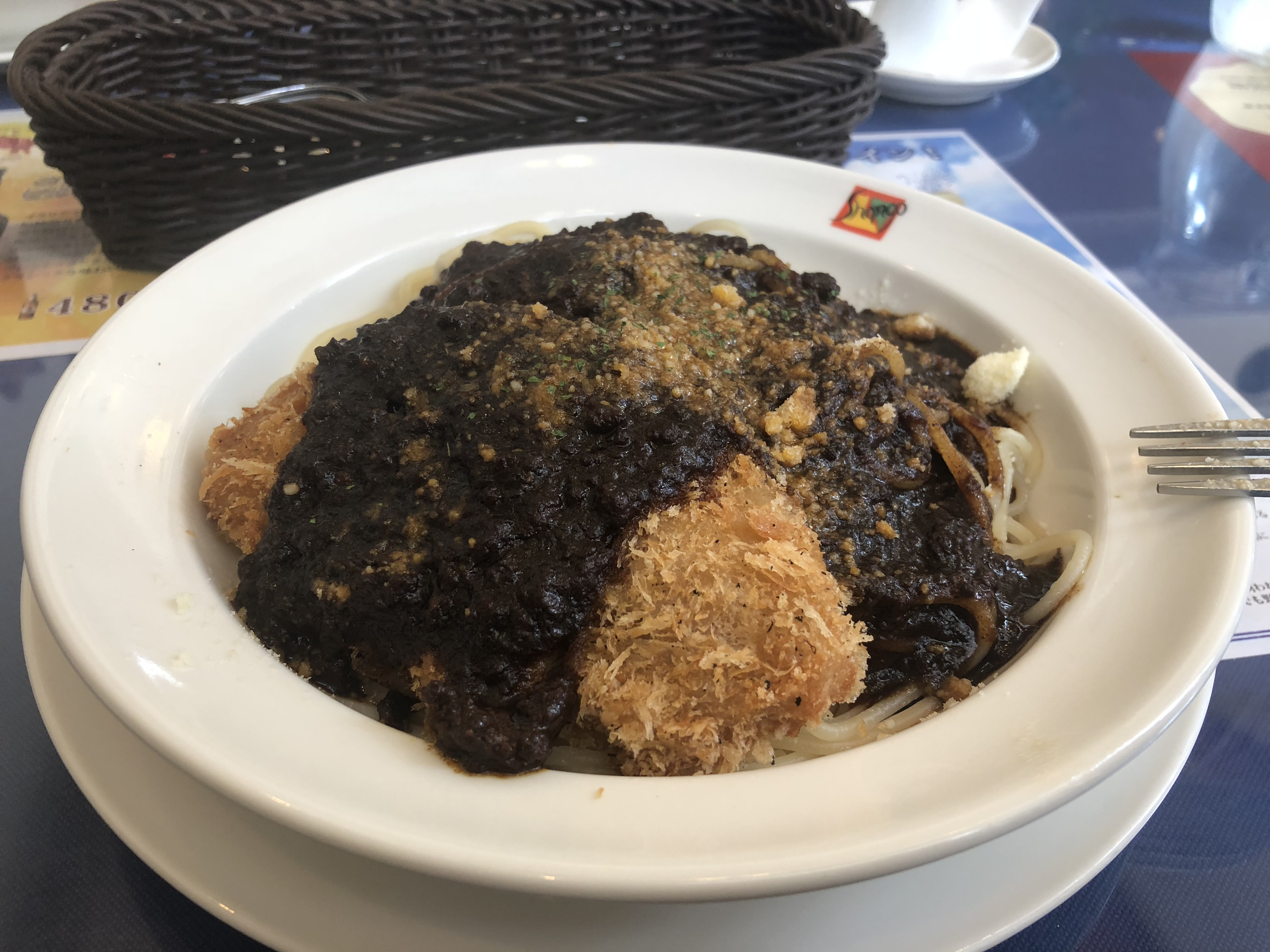 シャンゴで撮った名物のパスタの写真。